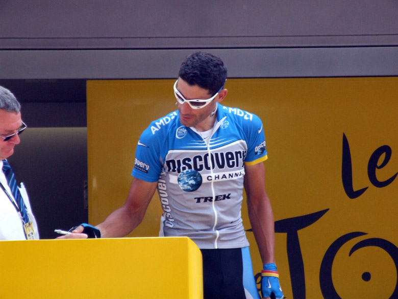 George Hincapie at Tarbes in 2006.